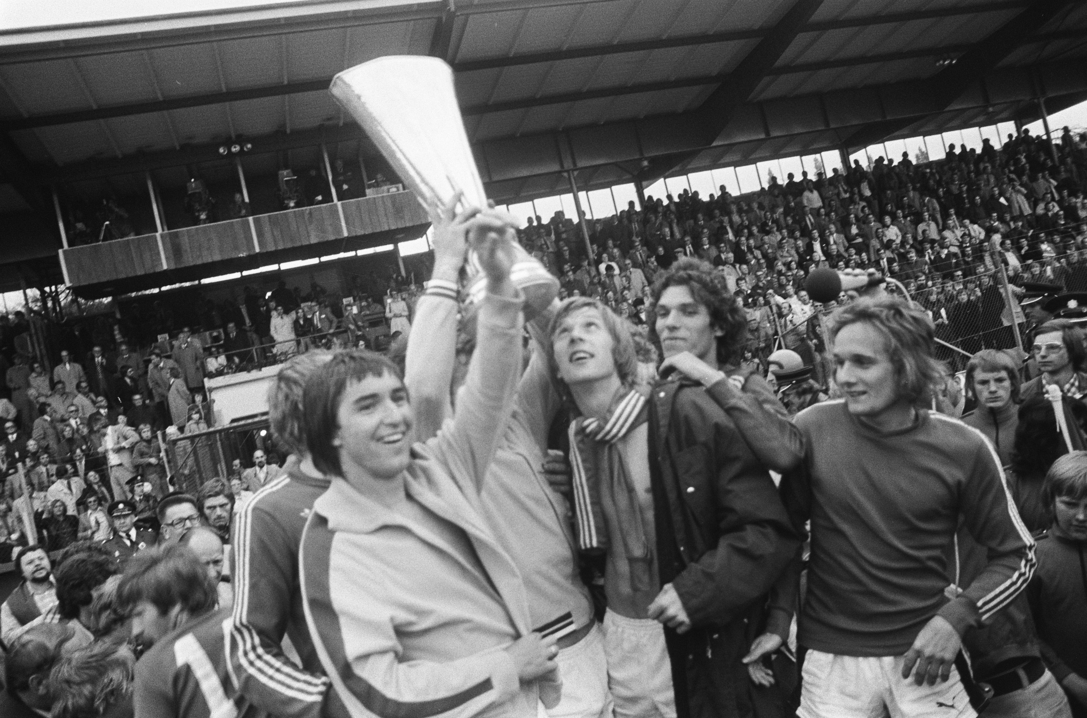 Aanvoerder Vogts (Borussia MG) met de UEFA-cup te midden van ploeggenoten